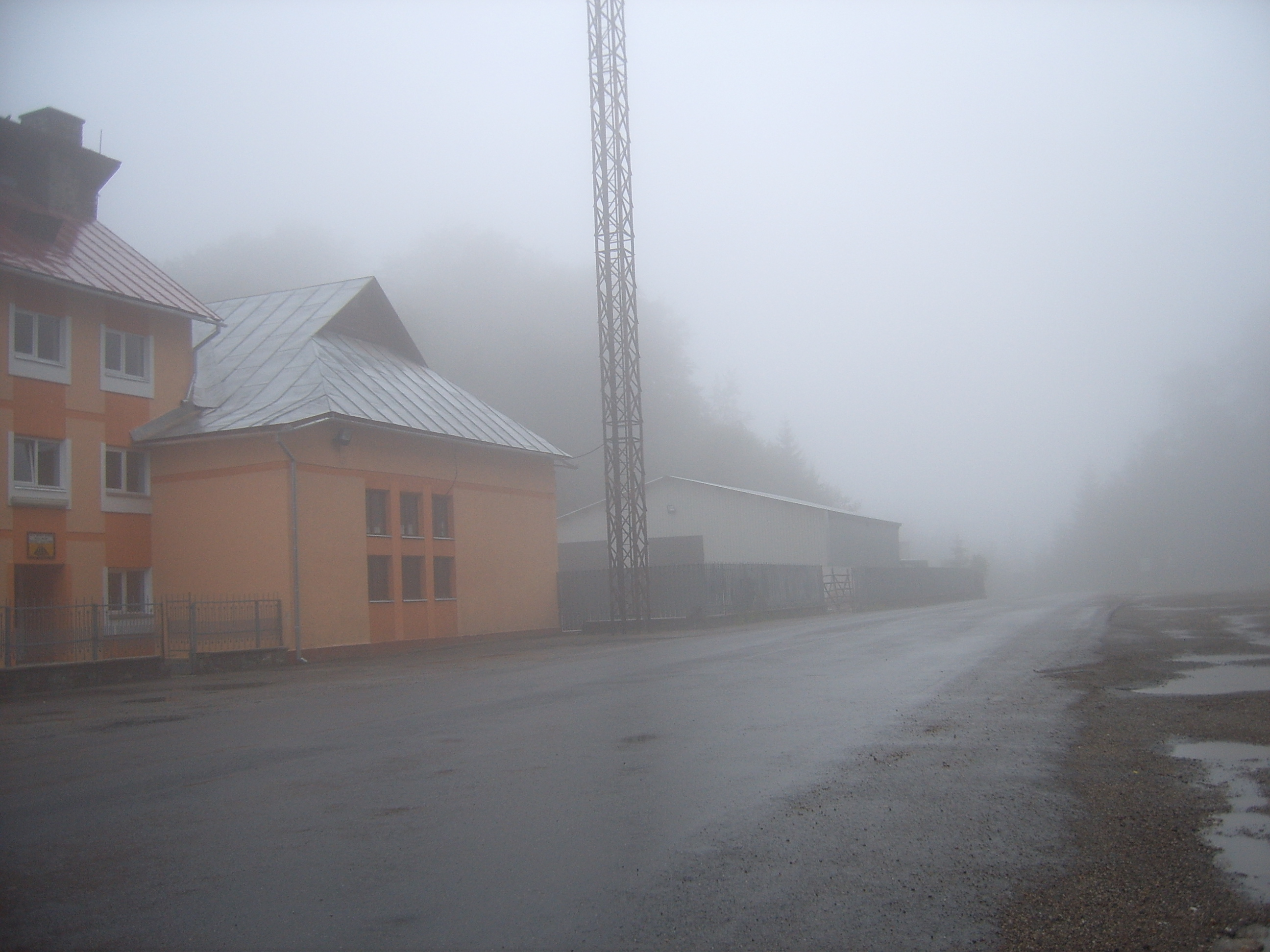 col de Gutii, Roumanie